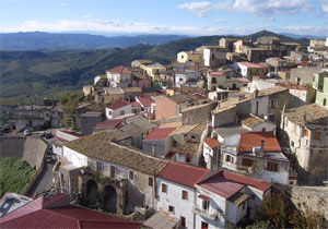 Cirò (KR)